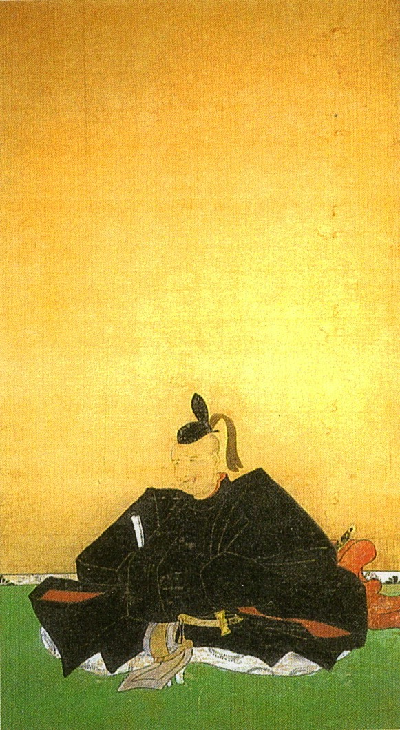 丹羽高寛の肖像画(市指定文化財)。